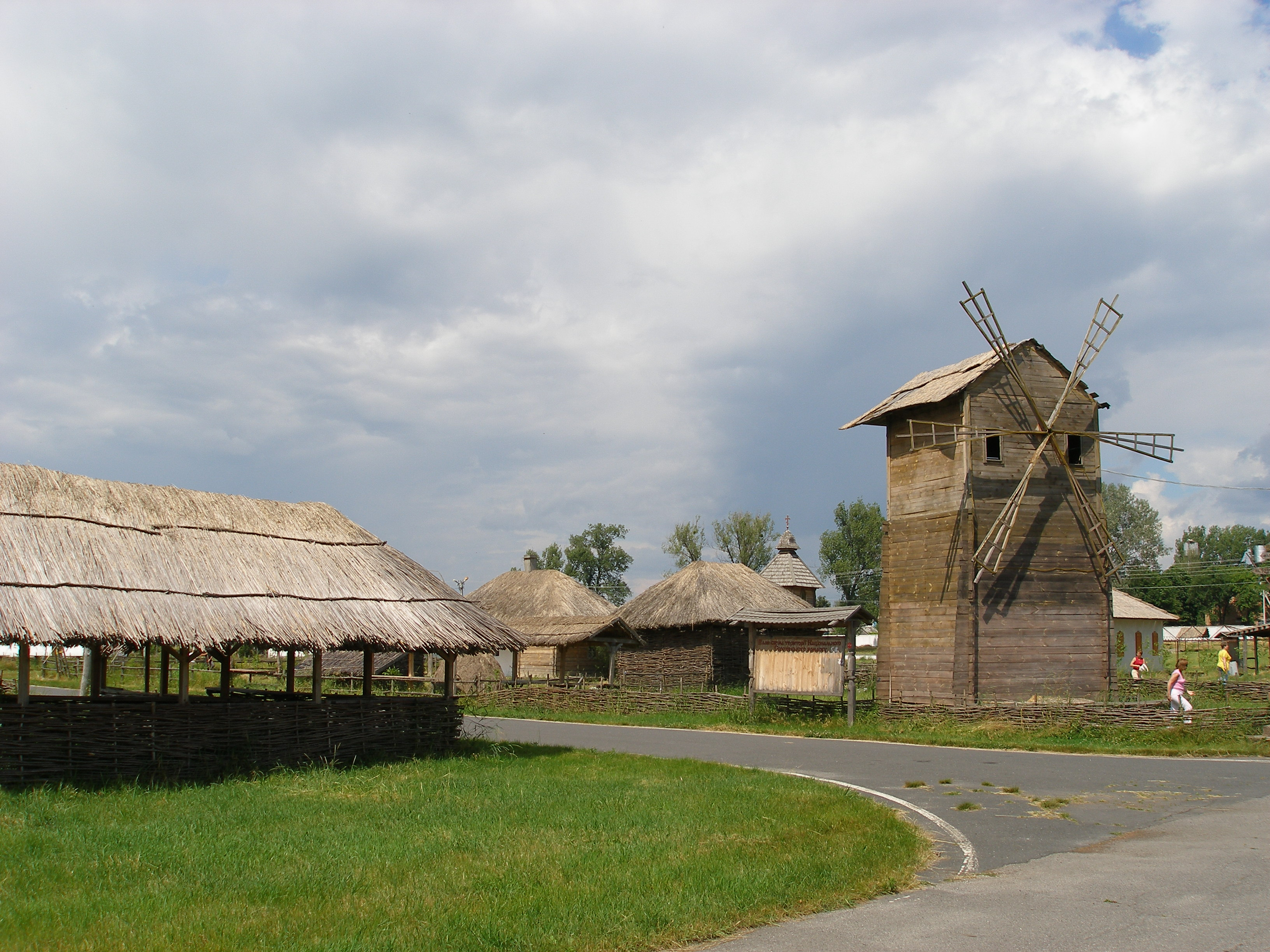 Площадь проведения Сорочинской Ярмарки